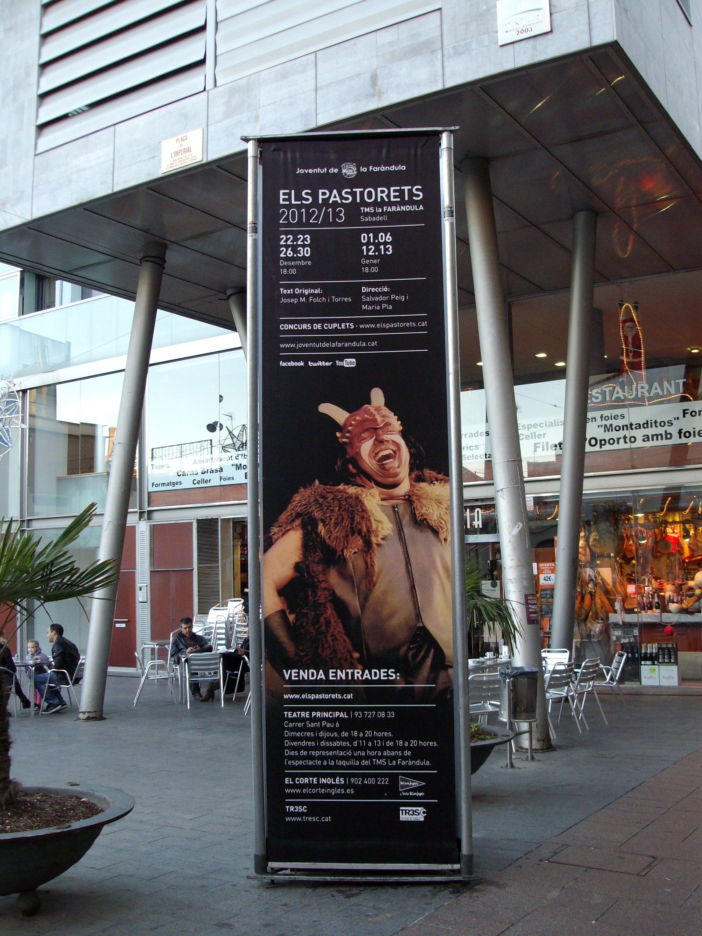 Cartel de la representación teatral de Els Pastorets por parte del grupo de teatro amateur "Joventut de la Faràndula" de Sabadell.